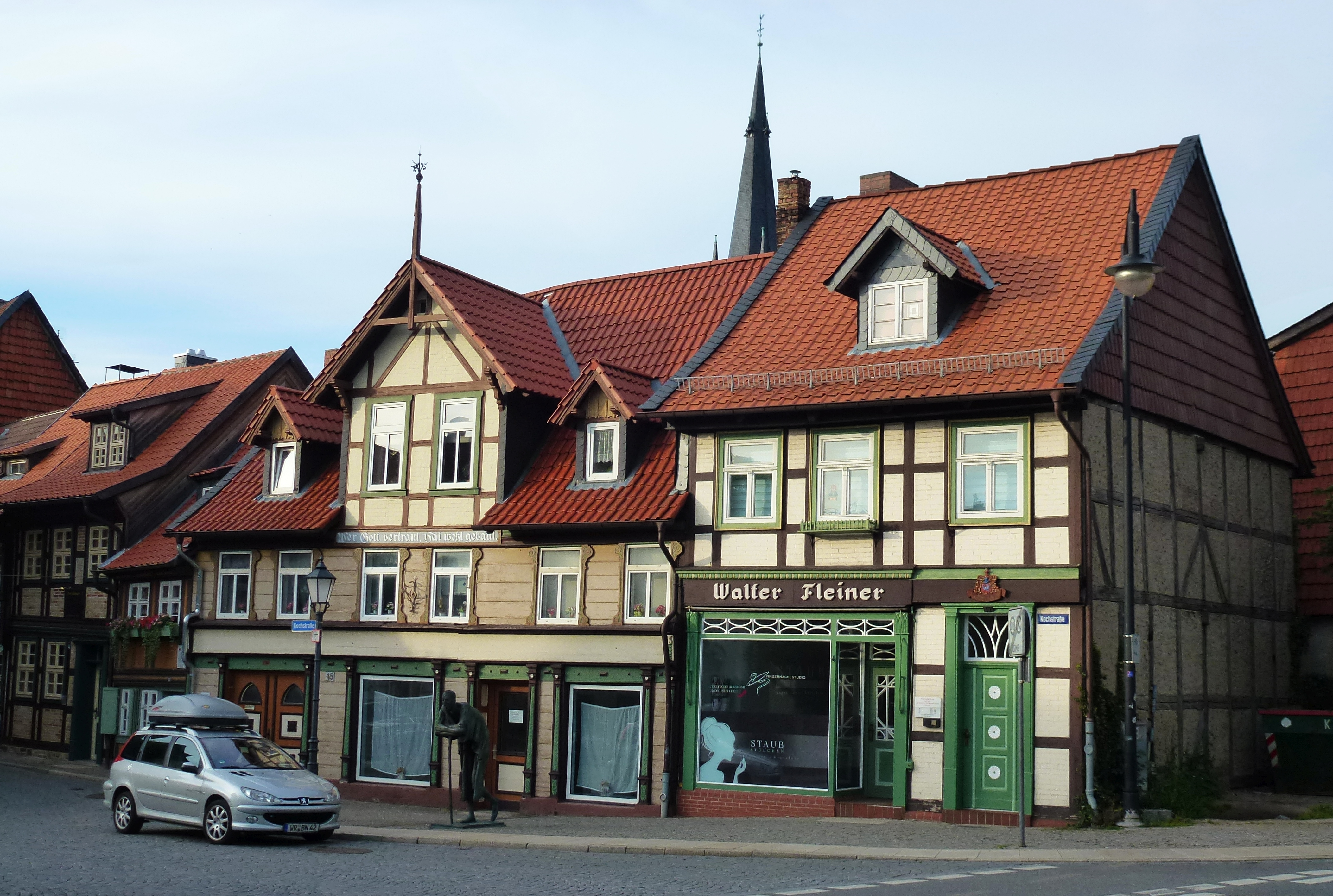 Blick auf die Häuser Kochstraße 43-47, links das kleinste Haus der Stadt in Nr. 43. Vor dem Haus Nr. 45 befindet sich die Skulptur „Die Rast“ von dem deutschen Bildhauer Joachim Jastram